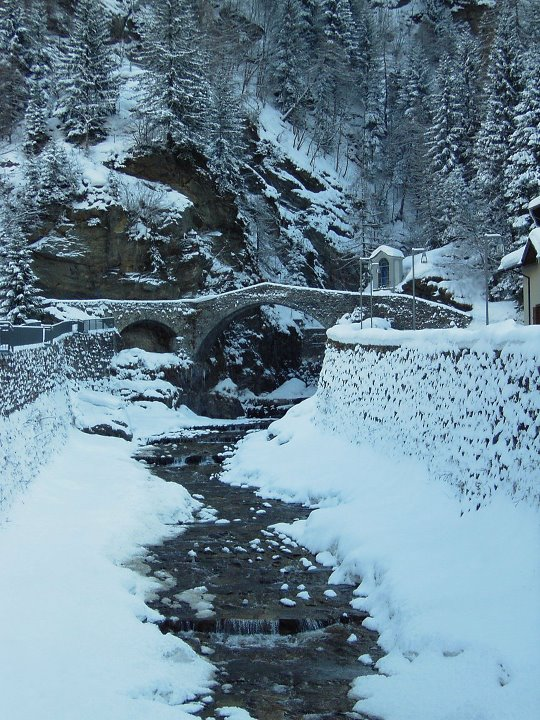 Ponte Romano (invernale)